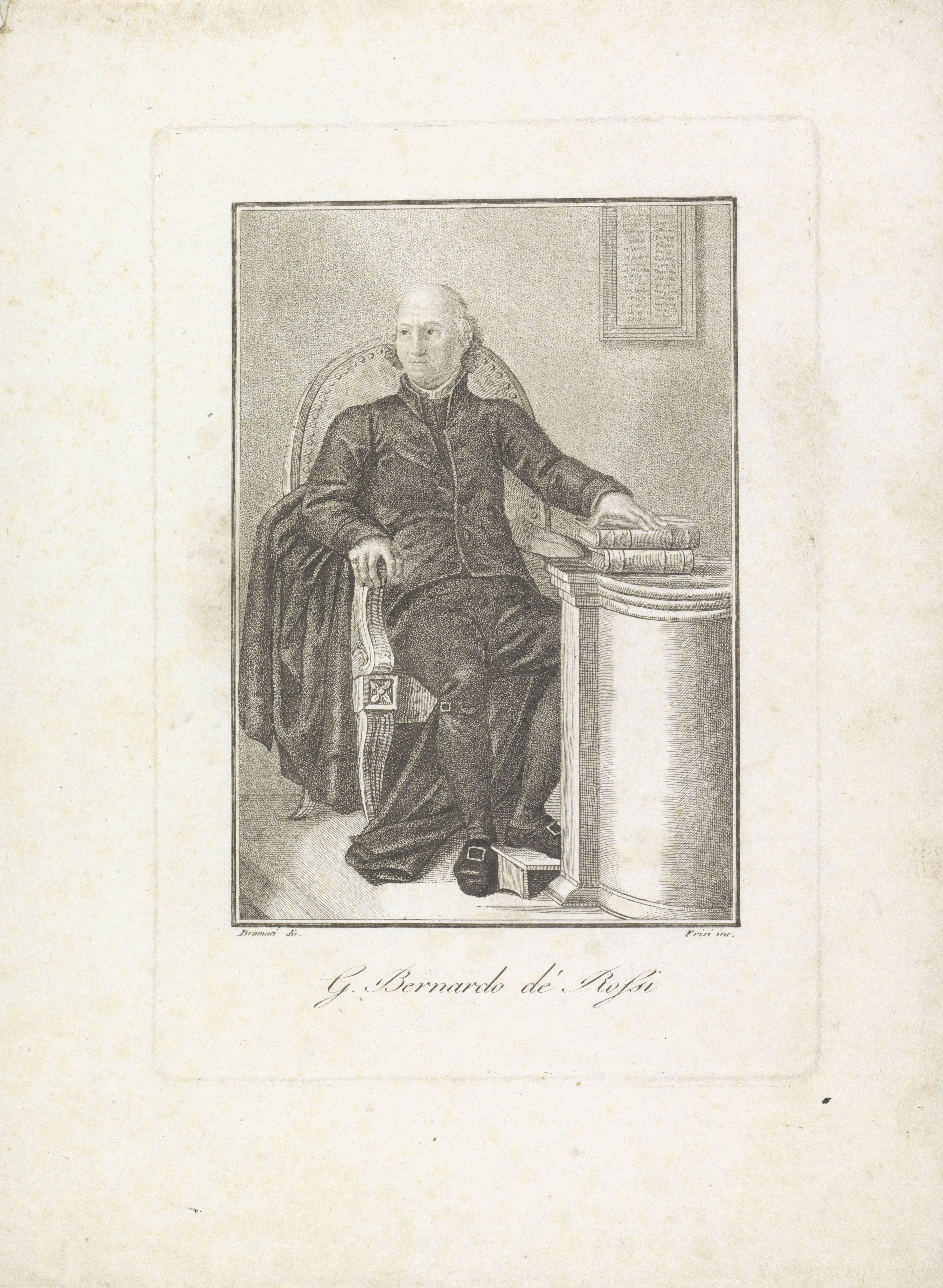 IdentificatieTitel(s): Portret van Hebraist Giovanni Bernardo De RossiObjecttype: prent Objectnummer: RP-P-1909-4931Opschriften / Merken: verzamelaarsmerk, verso, gestempeld: Lugt 2228VervaardigingVervaardiger: prentmaker: Frisi (vermeld op object)naar tekening van: Antonio BramatiPlaats vervaardiging: prentmaker: Italiënaar tekening van: VaticaanstadDatering: 1700 - 1799Fysieke kenmerken: stippelwerk en etsMateriaal: papier Techniek: stippelwerk / etsenAfmetingen: plaatrand: h 222 mm × b 155 mmOnderwerpWat: historical personsWie: Giovanni Bernardo de RossiVerwerving en rechtenVerwerving: aankoop 1905Copyright: Publiek domein